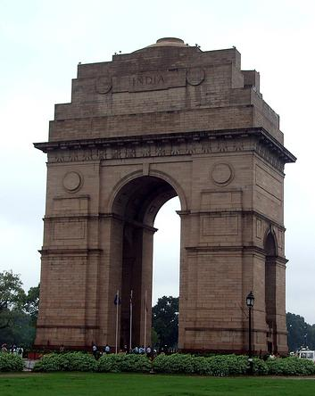 India Gate, Delhi